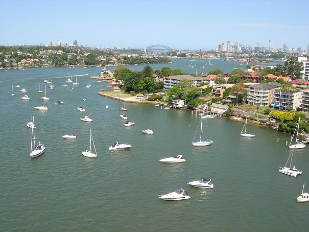 Parramatta River from Gladesville Bridge.jpg